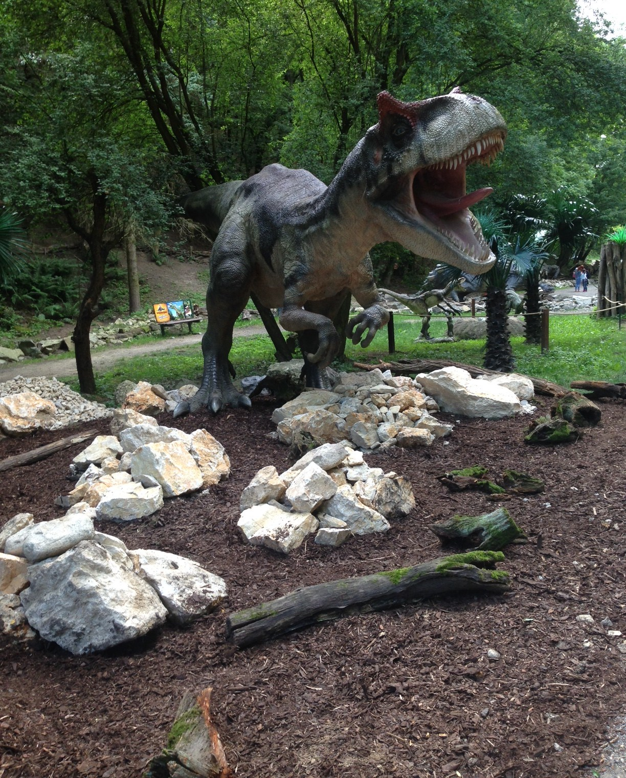 Allosaurus a new scene